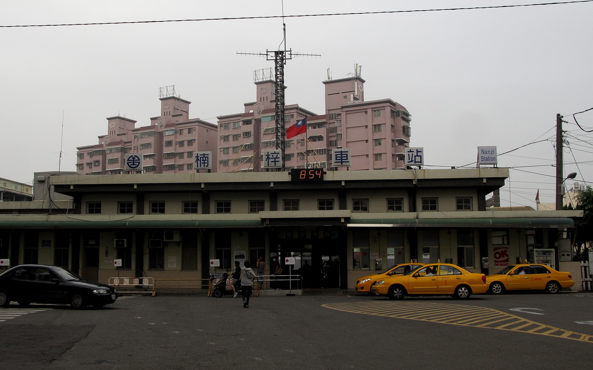 楠梓車站外部。